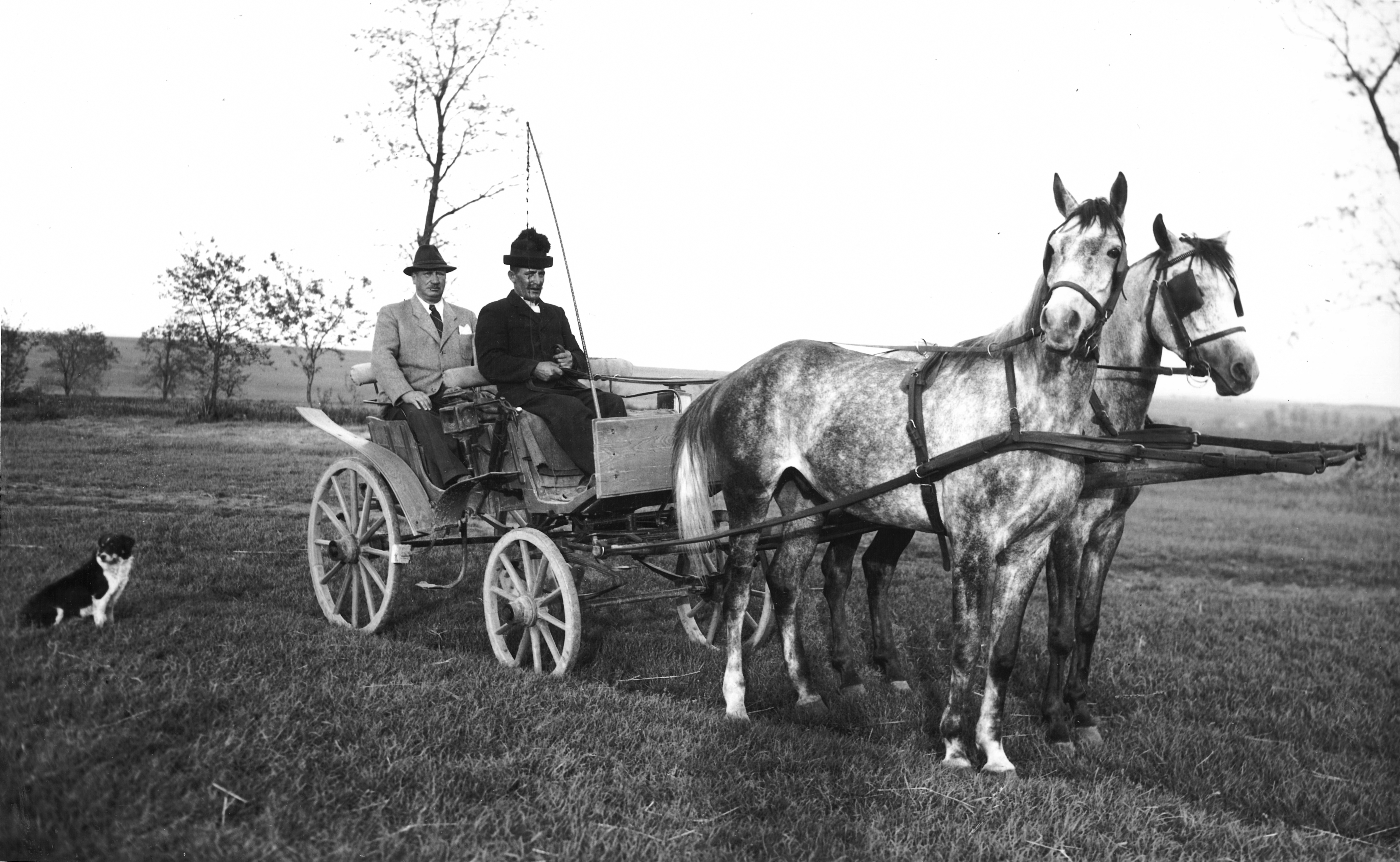 Fogat; kocsis; lószerszám; kutya; Magyarország. - Készítő:Carl Lutz Tags: coach, teamster, saddle, dog